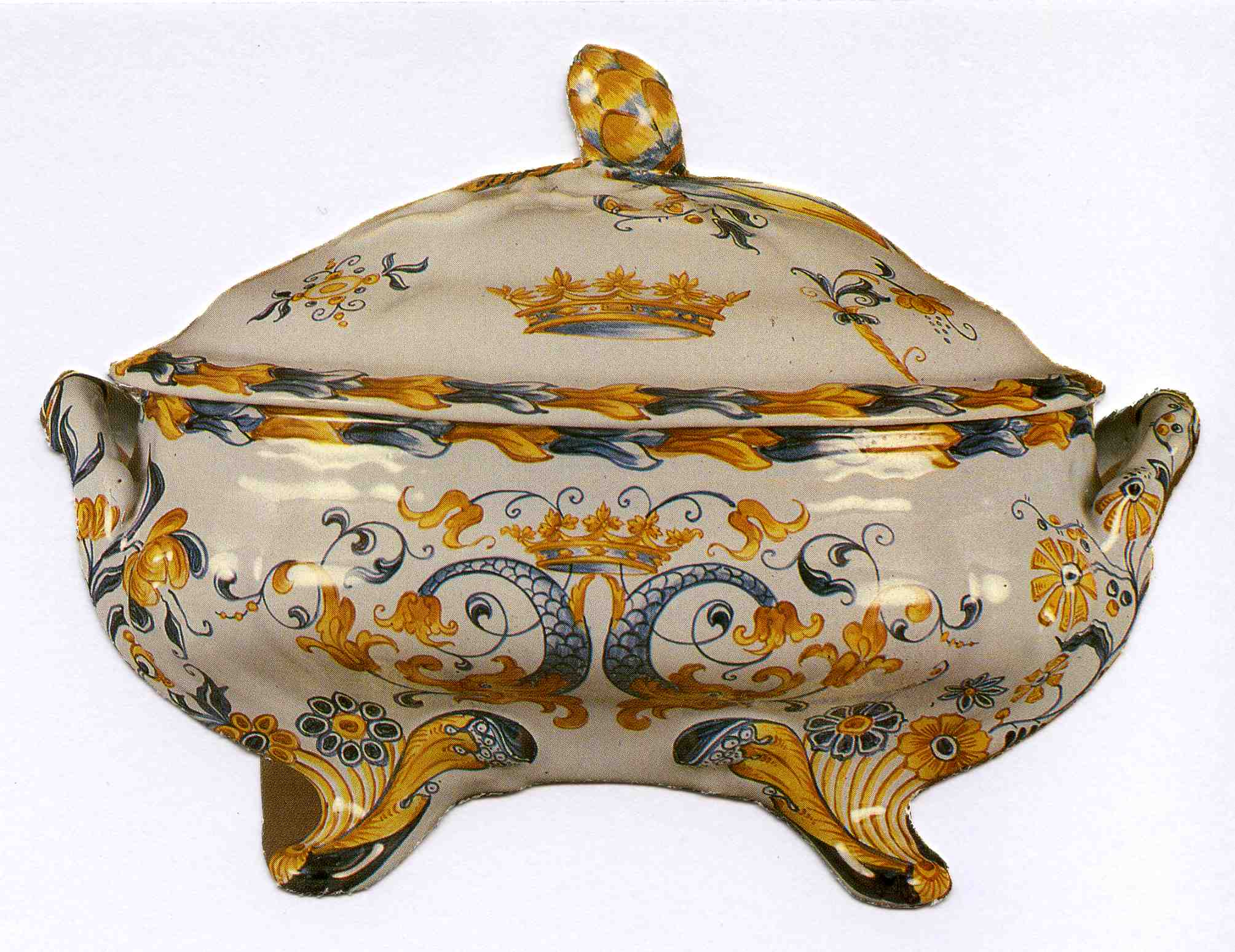 Soupière en faïence de Raon l'Etape